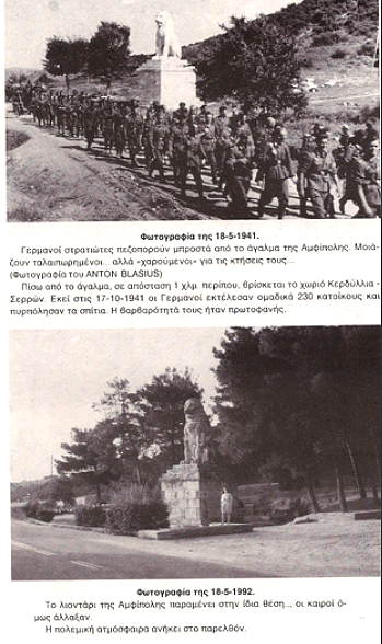 Ιστορική Φωτογραφία - Λέων Αμφίπολης